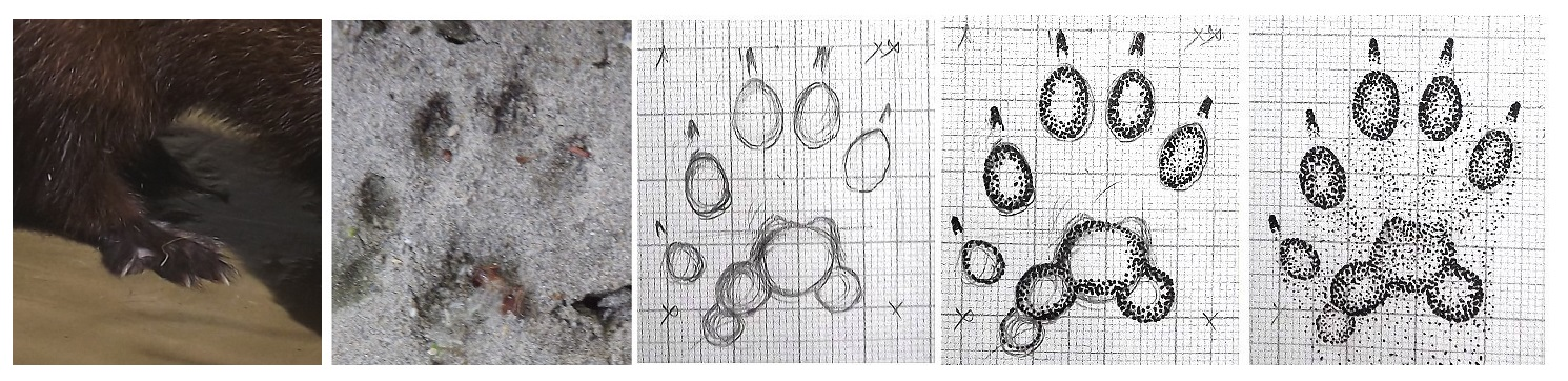 Proceso de creación de un icnotipo a partir de una huella